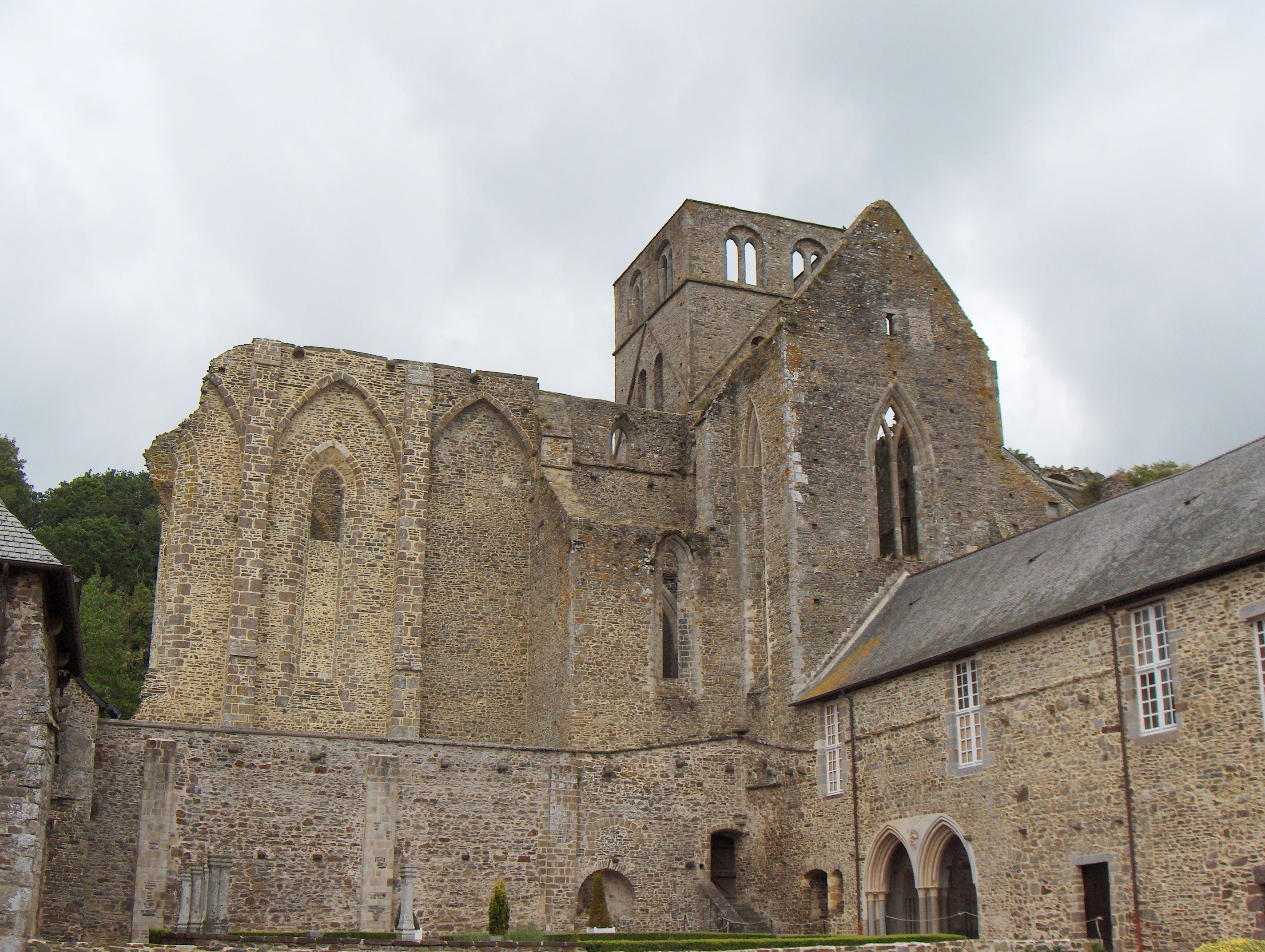 Beschreibung: Hambye (Frankreich, Dept. Manche), ehemalige Abtei (abbaye Notre Dame), Ruine der Abteikirche (12. - 13. Jh., romanisch, teilweise gotisch). Datum: 3. August 2006 Fotograf: Friedrich Tellberg